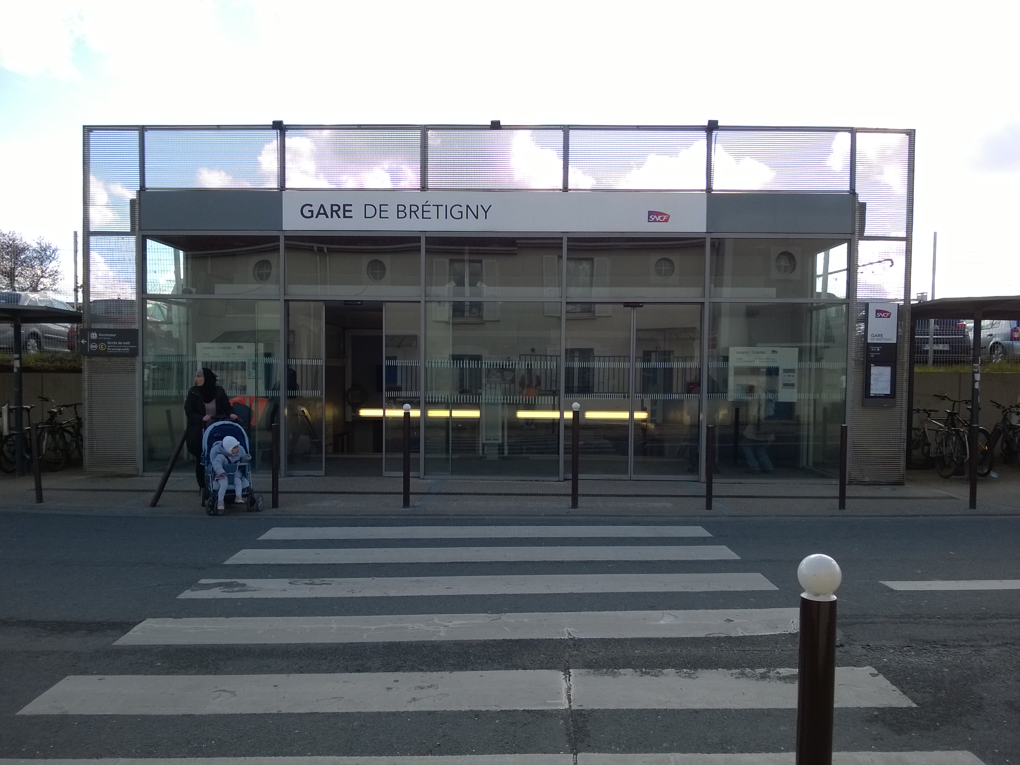 L'accès secondaire, rue Pierre Brossolette, département de l'Essonne, France.